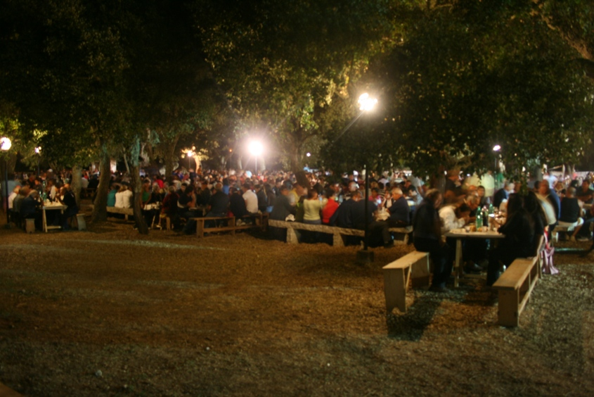 Buddusò, festa di Santa Reparata (foto del 2007). Domenica sera: cena "de su brou 'e sas concas" nel boschetto antistante la chiesa